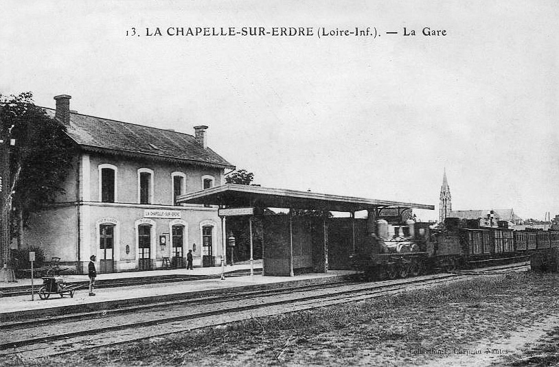 La gare de La Chapelle-sur-Erdre vers 1900.